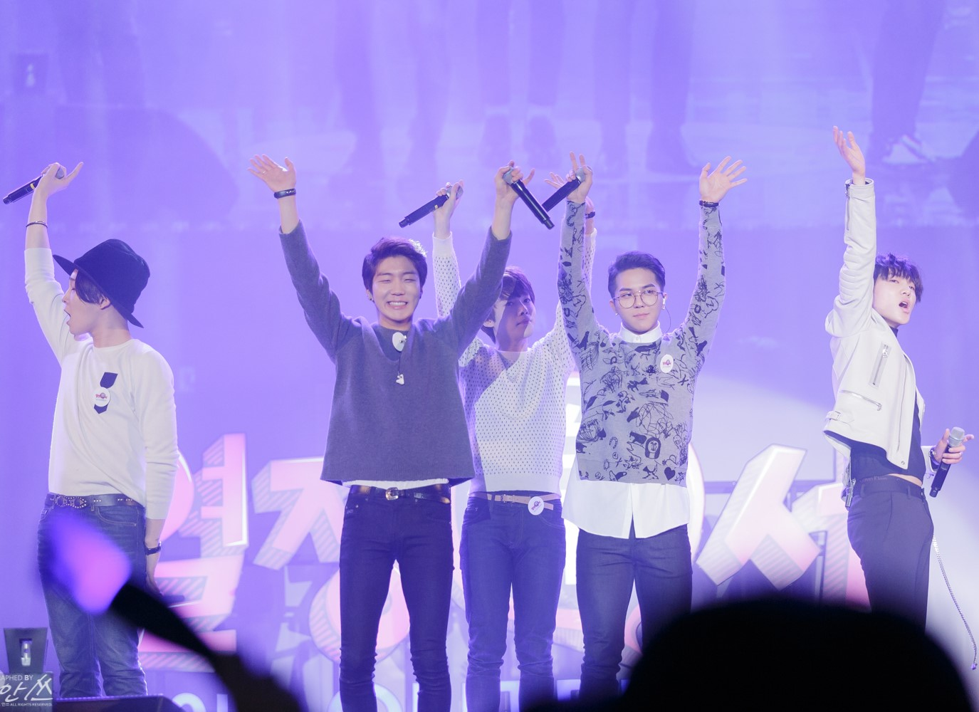 141111 위너열정락서